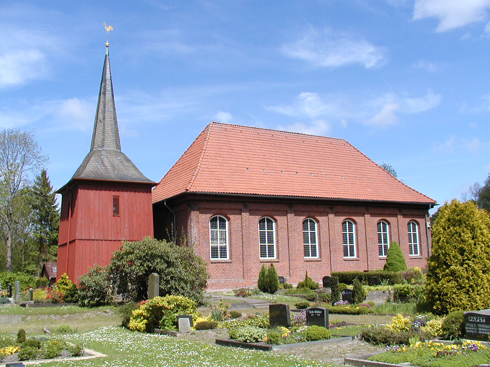 Die Kirche in Kedingbruch